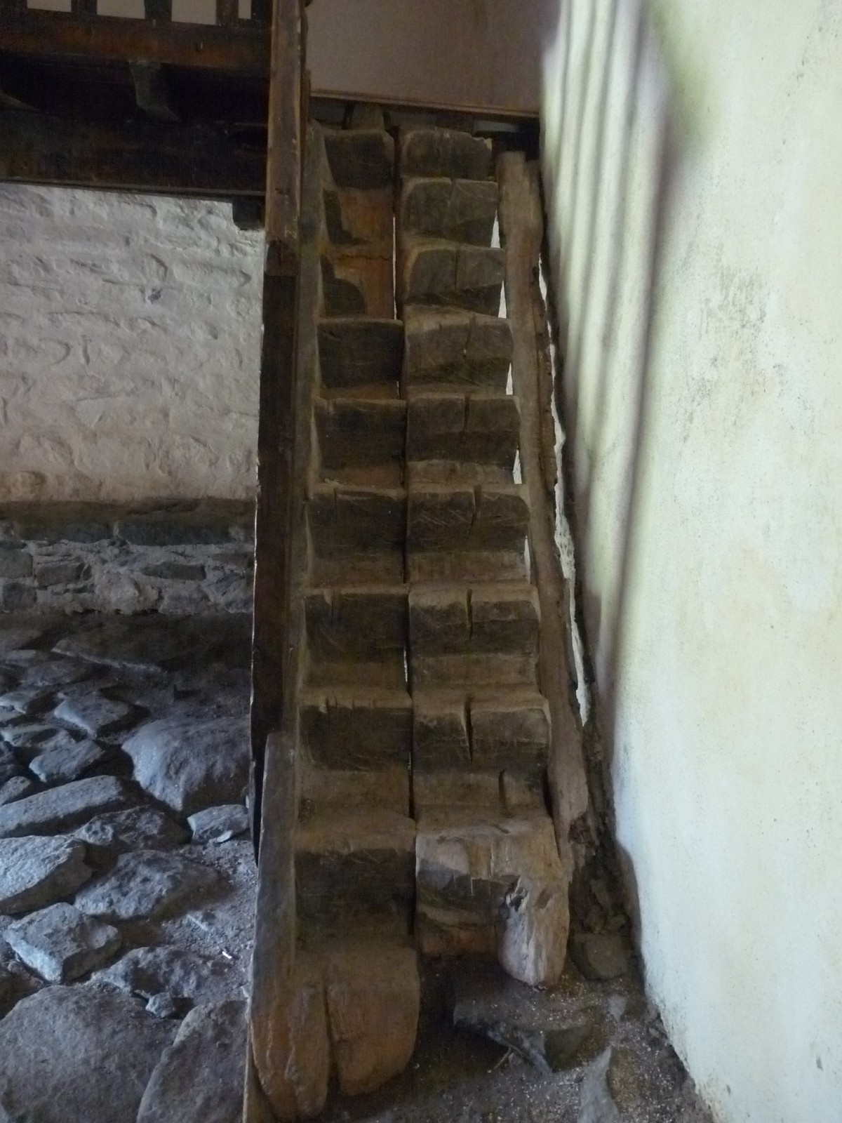 Chapelle St-Martin d'Envalls, Pyrénées-Orientales, France